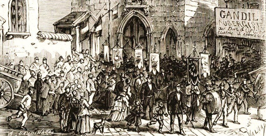 Défilé des orphéons au concours d'Orphéons d'Etampes le dimanche 19 mai 1873 - Détail d'une gravure parue dans Le Monde Illustré du 24 mai 1873.